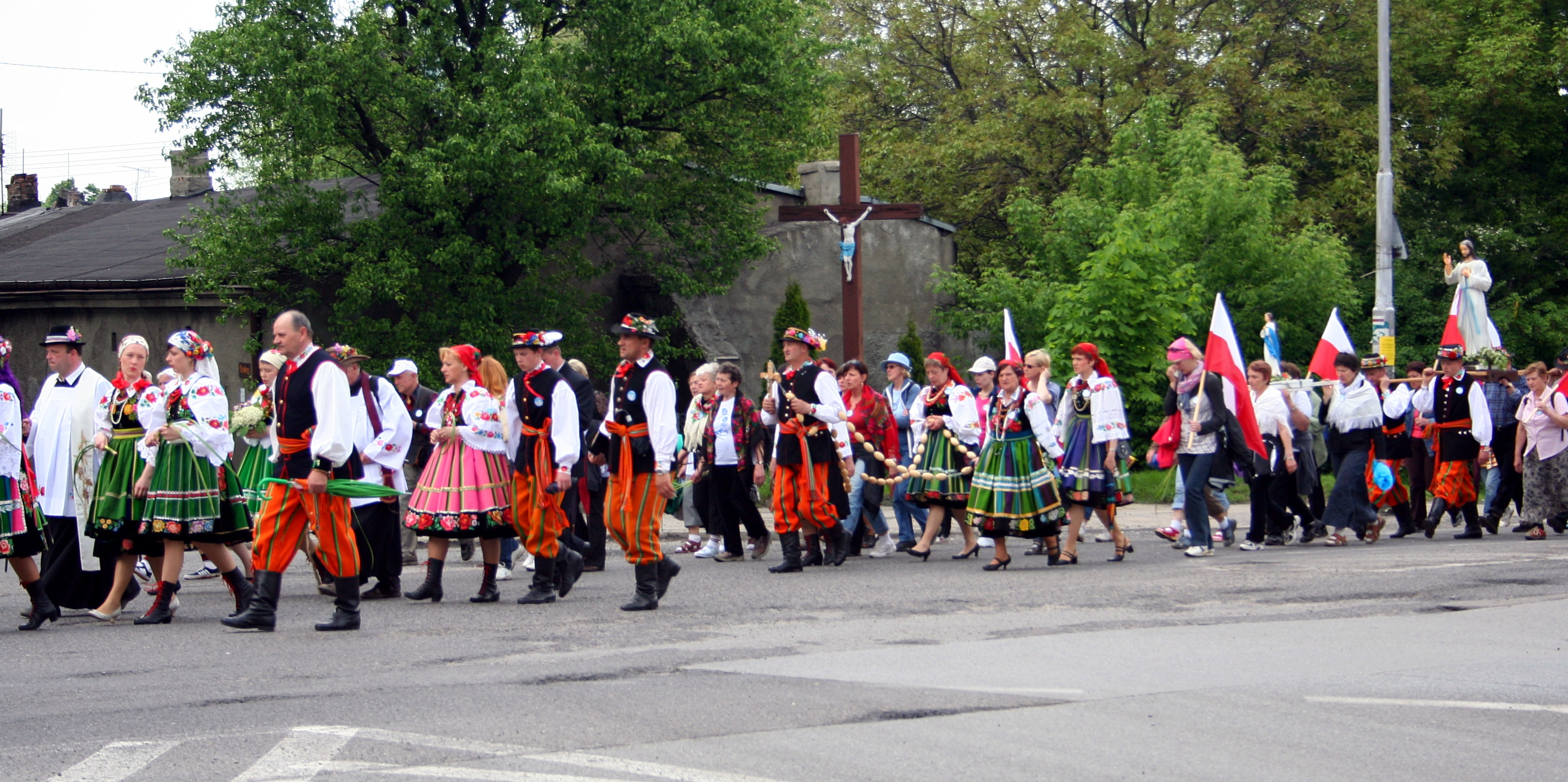 Częstochowa: Pielgrzymka Łowicka na Jasną Górę na ulicy Mirowskiej.